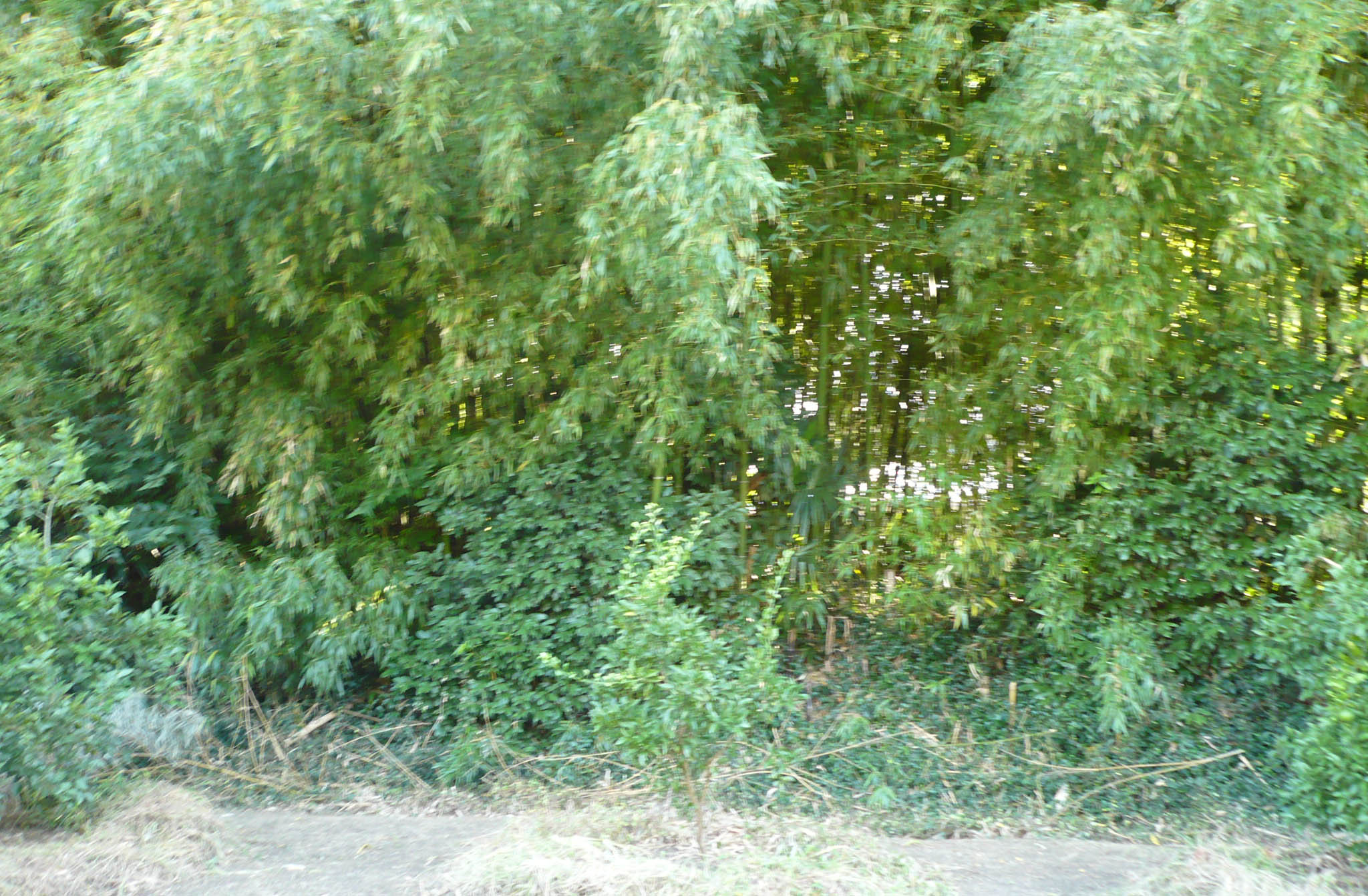 土塁跡